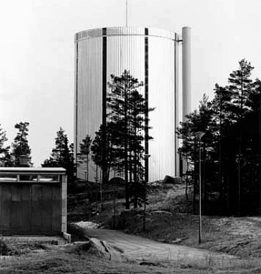 Haninges vattentorn 1964